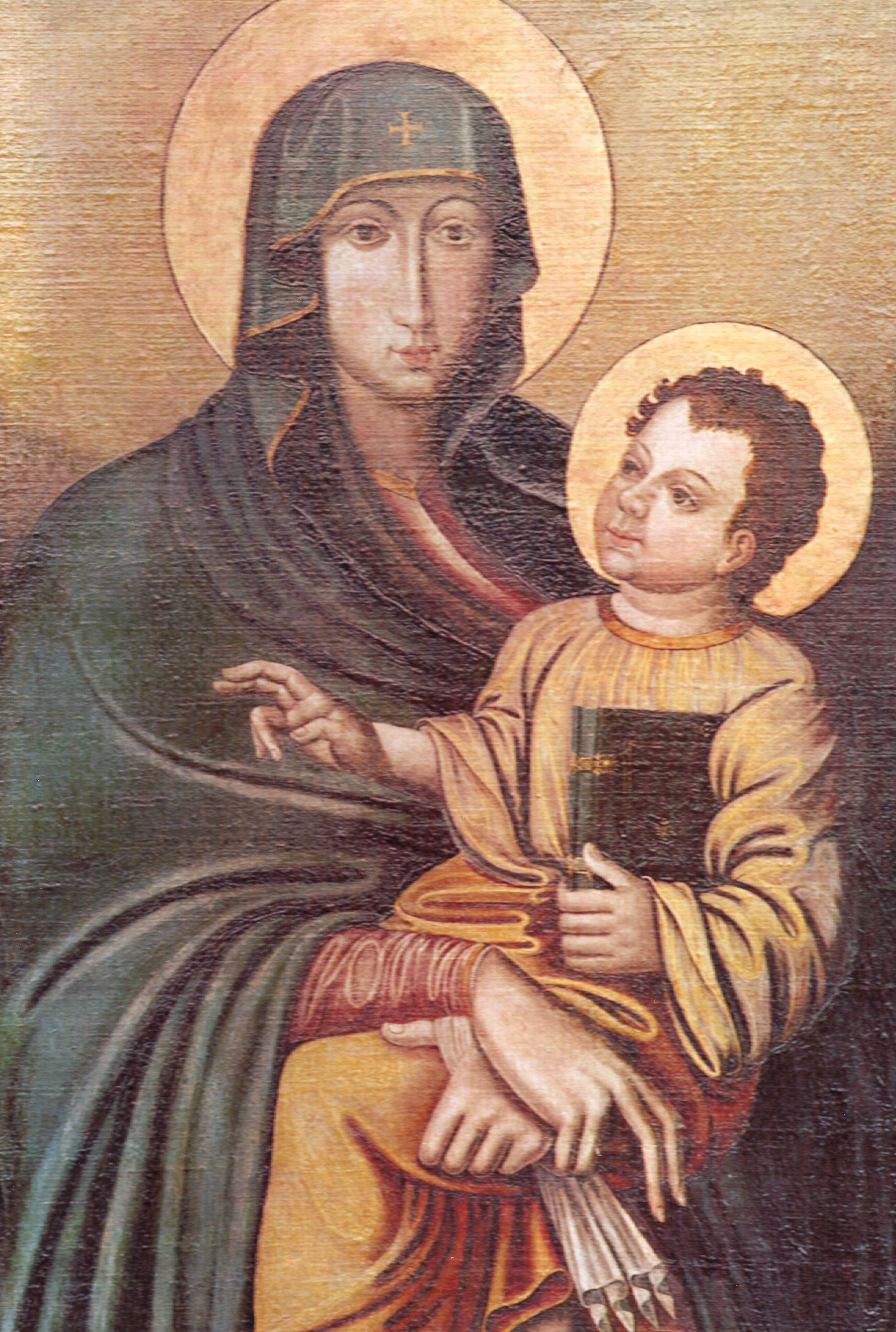 "Dreimal wunderbare Mutter" im Liebfrauenmünster Ingolstadt, eine Abwandlung der Marienikone „Salus populi romani“ in der Cappella Paolina in Santa Maria Maggiore in Rom. Die Kopie war ein Geschenk des Jesuitengenerals Francisco de Borja an das Jesuitenkolleg in Ingolstadt.